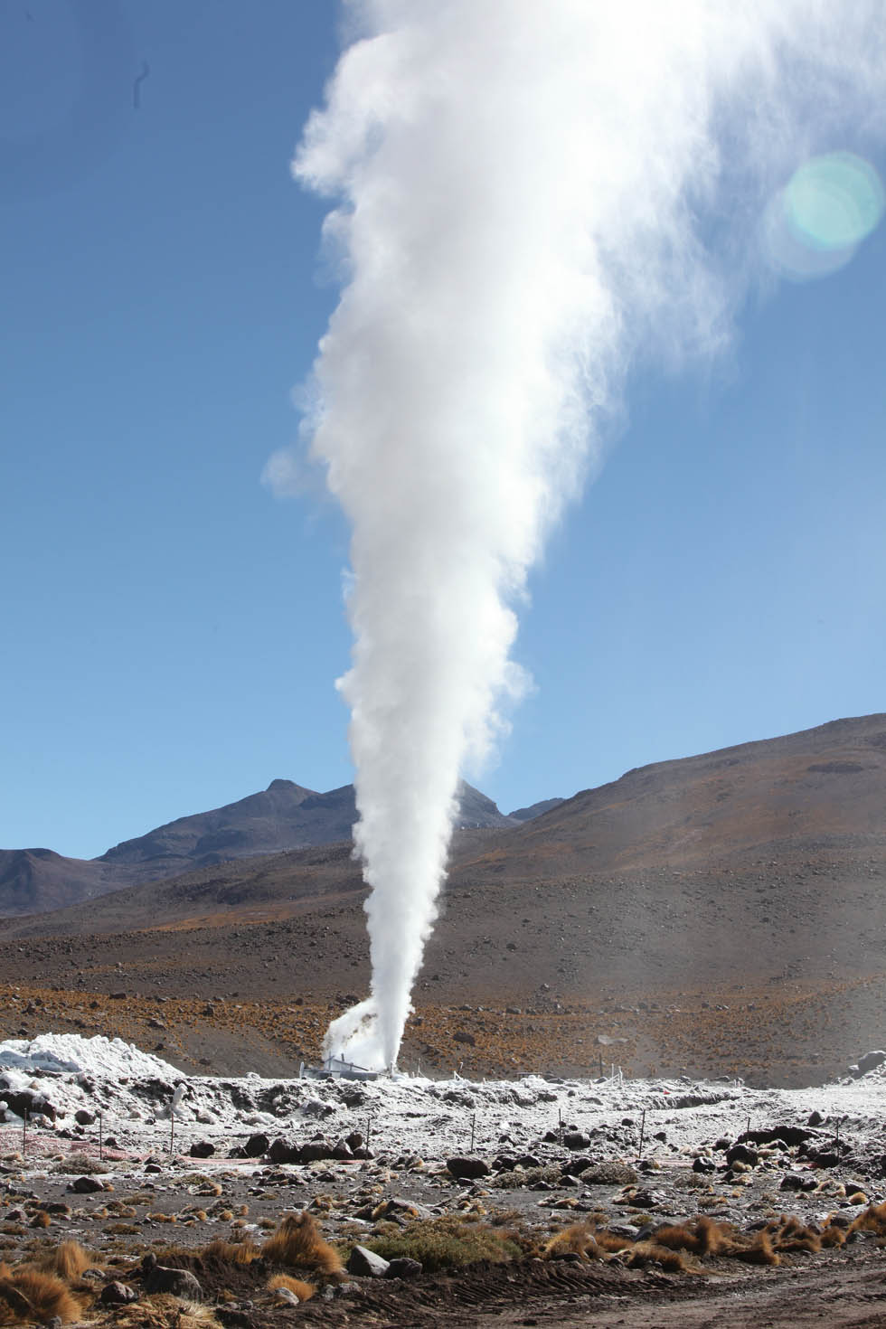 Reprueba el daño causado en esta área.